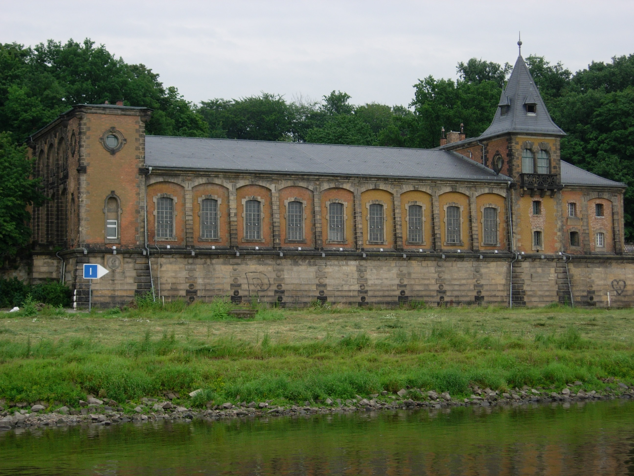 Wasserwerk Saloppe (Dresden)